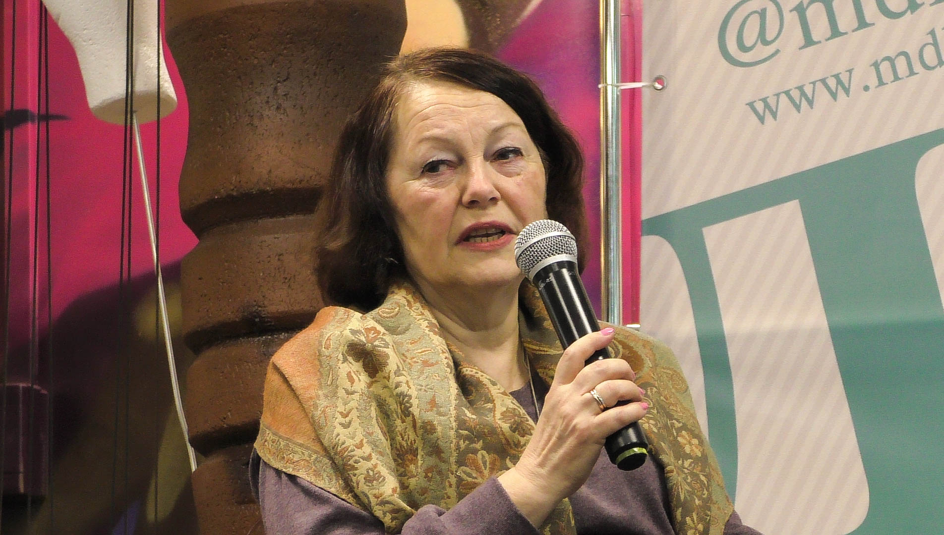 Московский Дом Книги. Ольга Игоревна Зубова на презентации своей (в соавторстве с Андреем Зубовым) книги "Религия Древнего Египта. Ч. 1. Земля и боги".